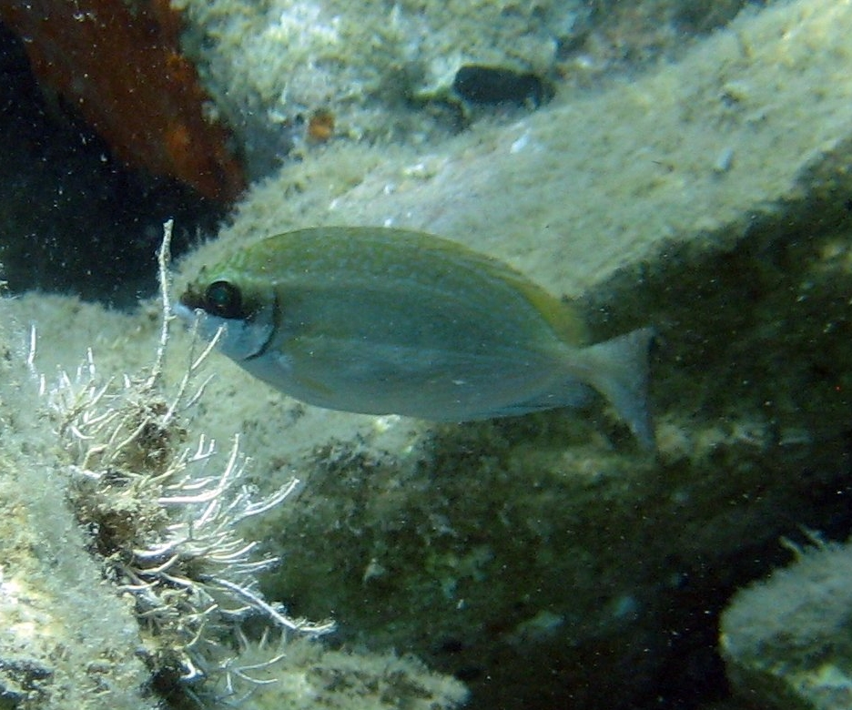 Siganus luridus, Grecia